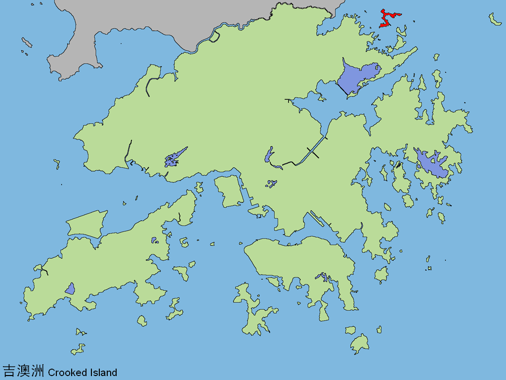 中文（香港）: 香港吉澳島。